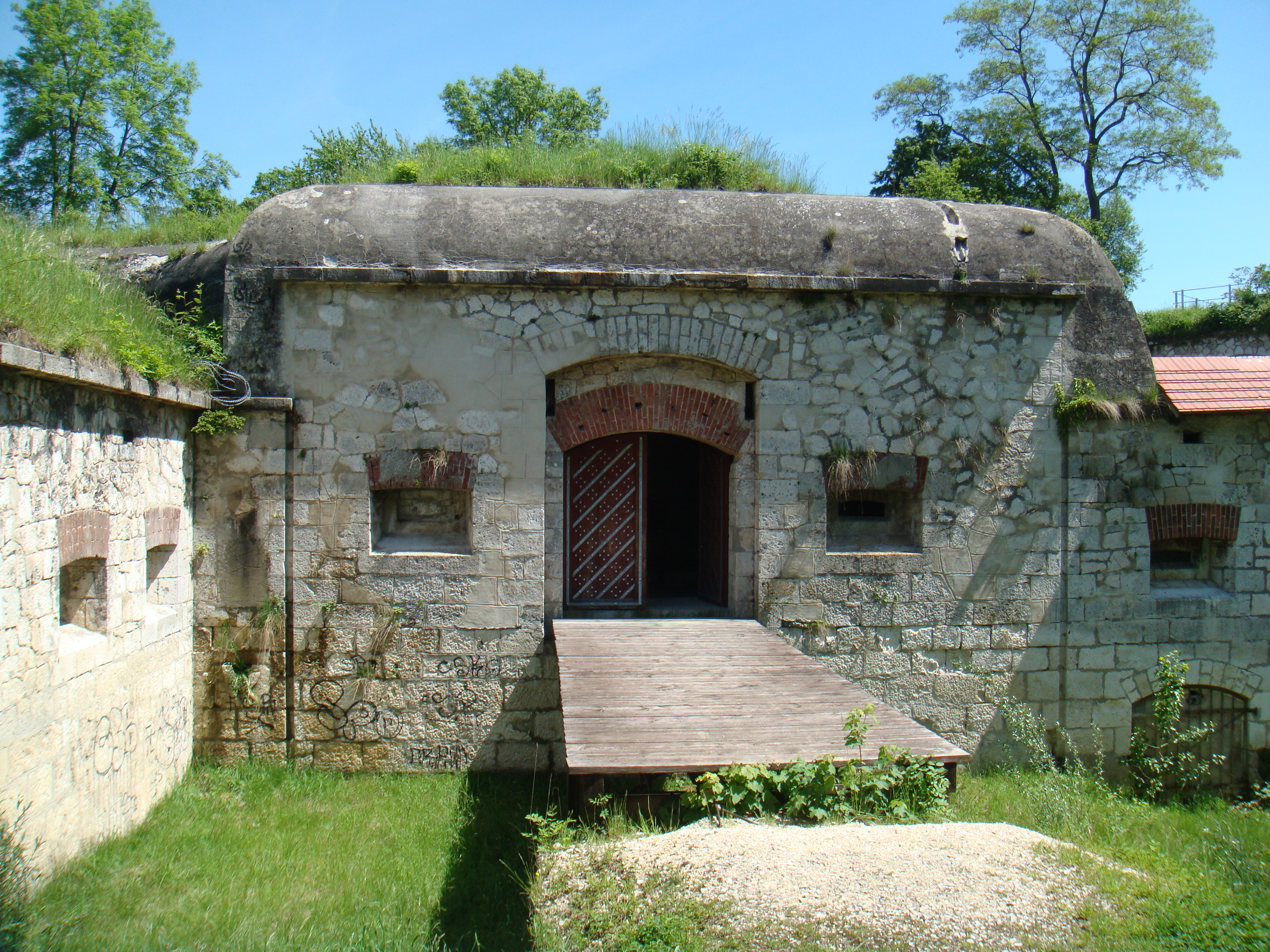 Eingang in das Reduit von Werk Friedrichsau